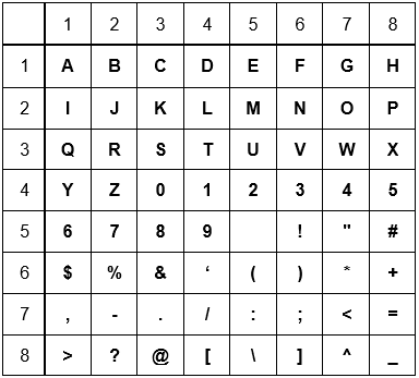 Cette image représente la variante du carré de Polybe avec des chiffres et des symboles.